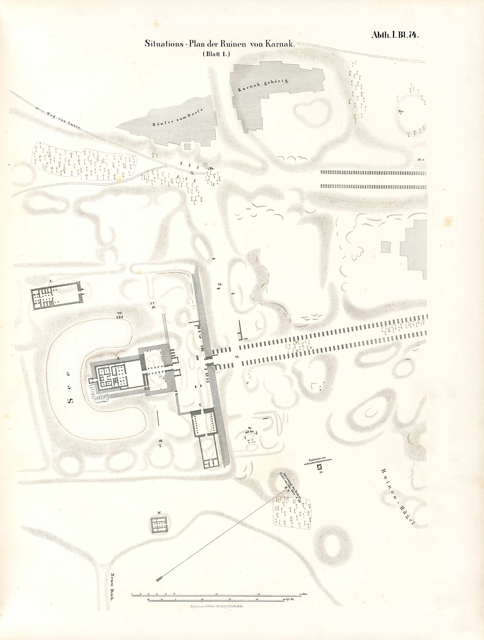 Denkmaeler aus Aegypten und Aethiopien nach den Zeichnungen der von Seiner Majestät dem Koenige von Preussen, Friedrich Wilhelm IV., nach diesen Ländern gesendeten, und in den Jahren 1842–1845 ausgeführten wissenschaftlichen Expedition auf Befehl Seiner Majestät